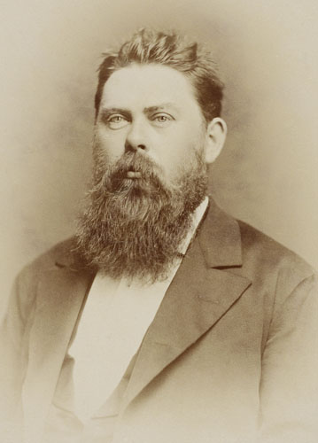 Danish zoologist William Emil Sørensen (1848-1916)